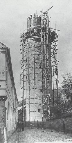 Der Buddenturm in Münster, Deutschland: Umbau zum Wasserturm zwischen 1878-1880